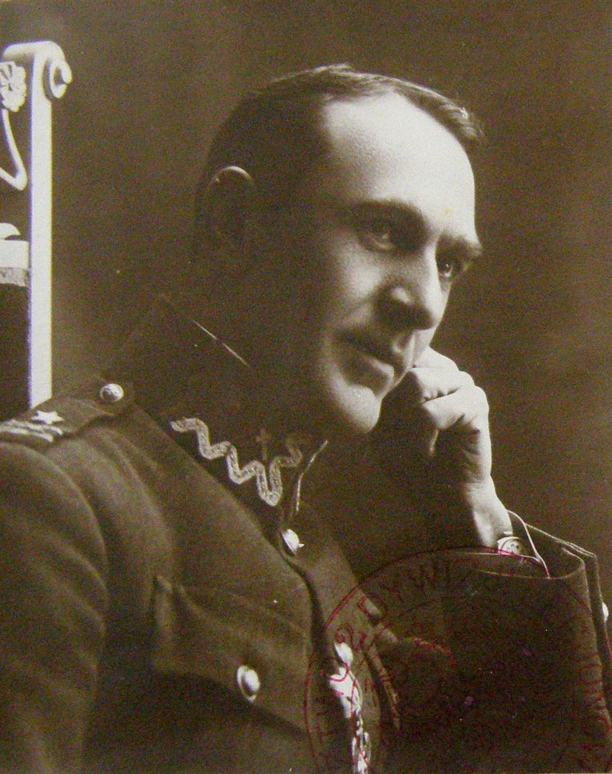 W mundurze Legionisty.